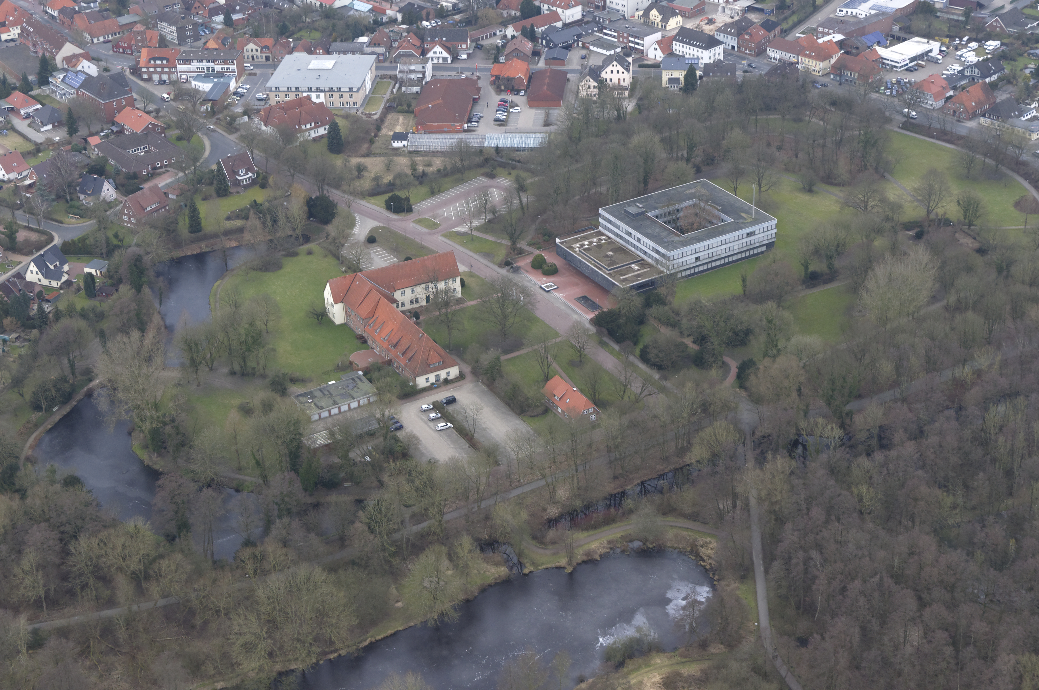 Bremervörde